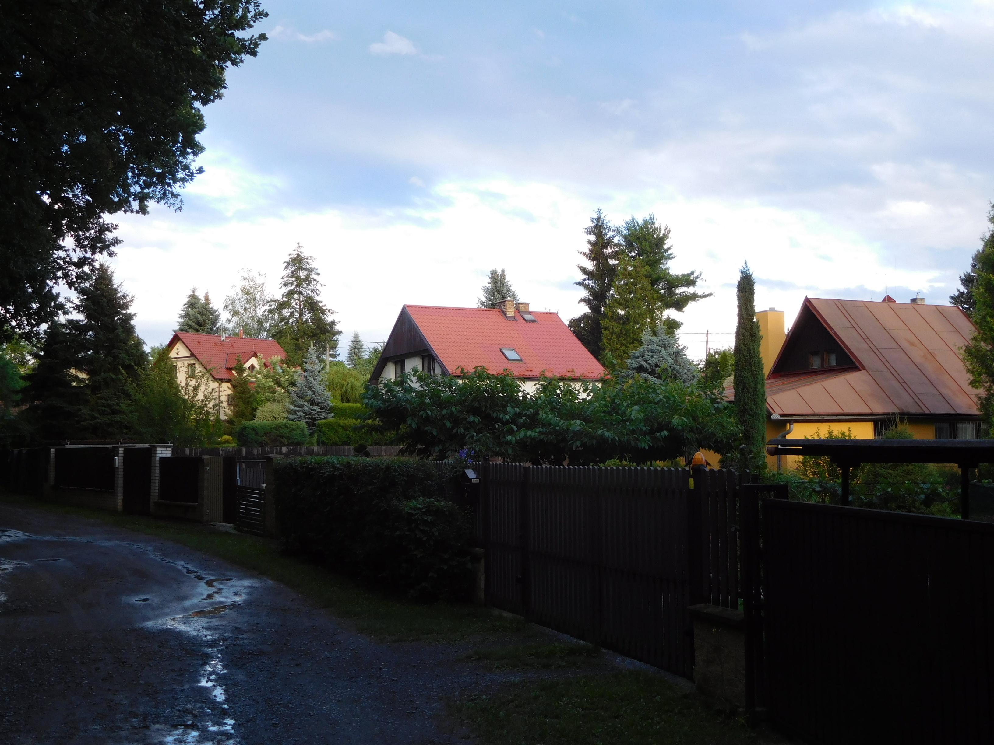 Zálepy - ulice Na Zálepech (zleva č.p. 105, 112, 114)